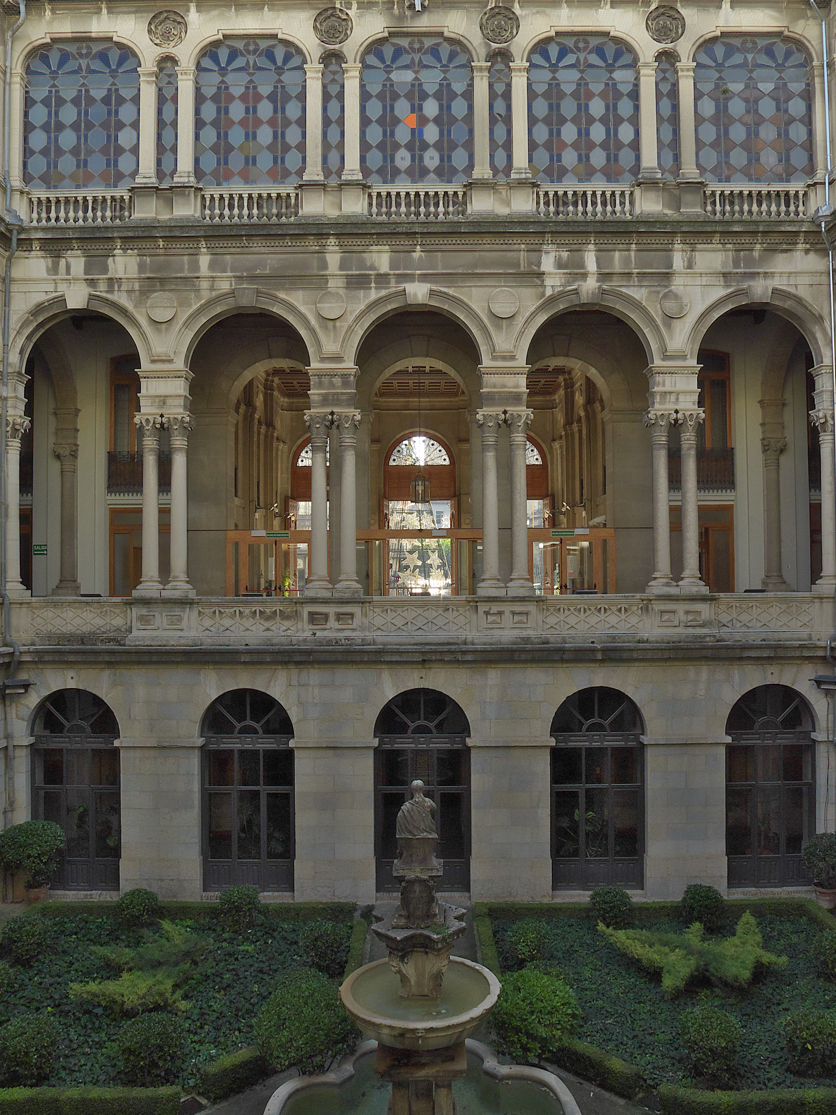 Justino Flórez Llamas modificará y finalizará (1885-1895) el proyecto original de Jorge Porrúa y Moreno.